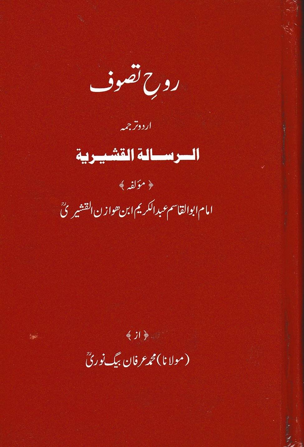 سرورق کتاب روح تصوف اردو ترجمہ الرسالۃ القشیریۃ